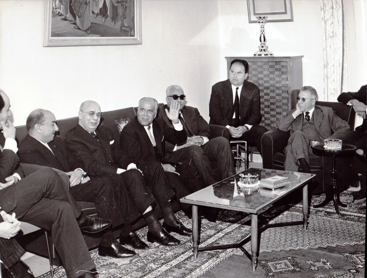 Ministres tunisiens, de gauche à droite : Mohamed Mzali, Ferjani Bel Hadj Ammar, Sadok Mokaddem, Habib Bourguiba, Bahi Ladgham, Hassib Ben Ammar et Hédi Nouira